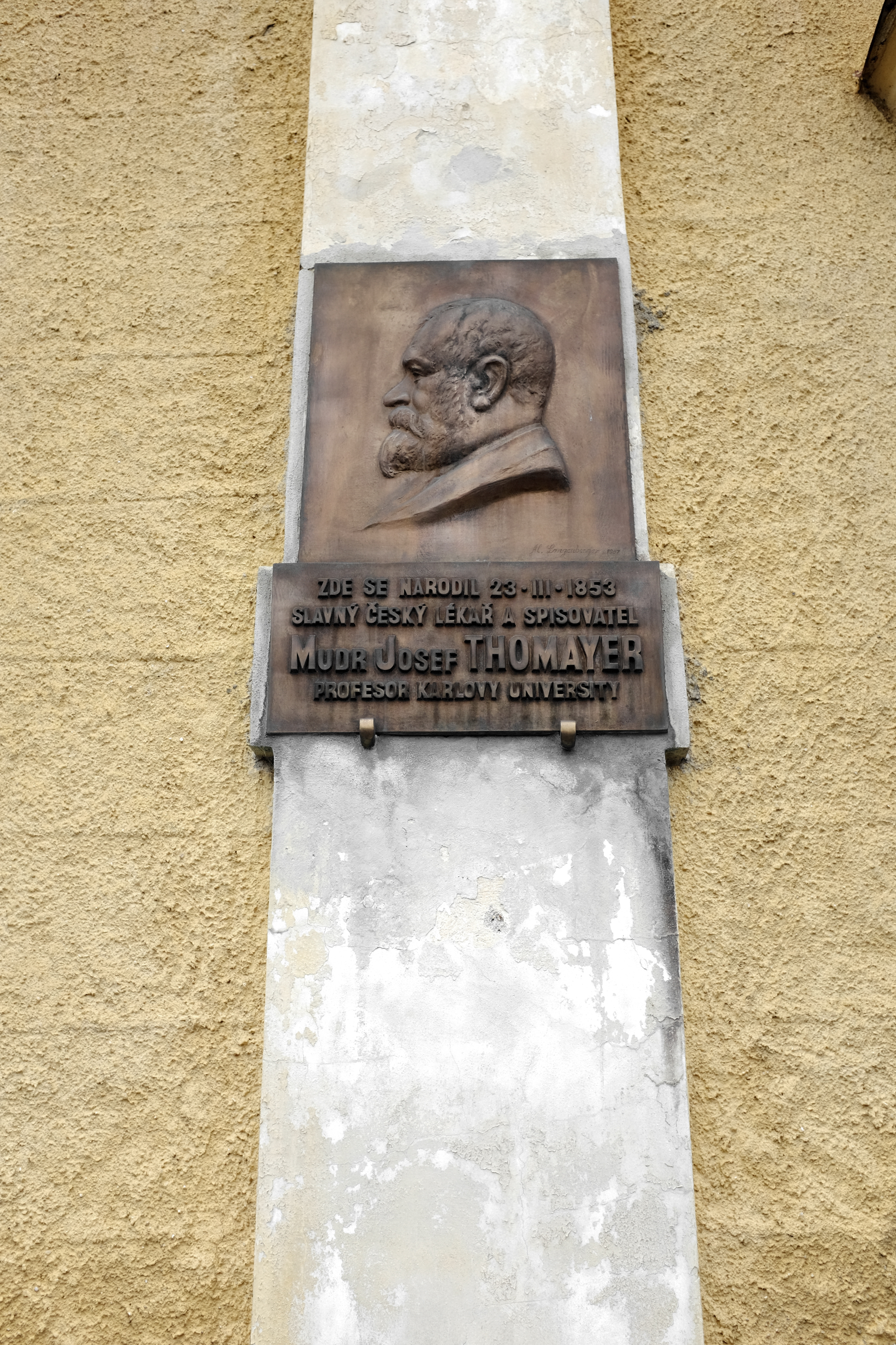 Zámek Trhanov, Trhanov 1, pamětní deska Josefa Thomayera, Trhanov.